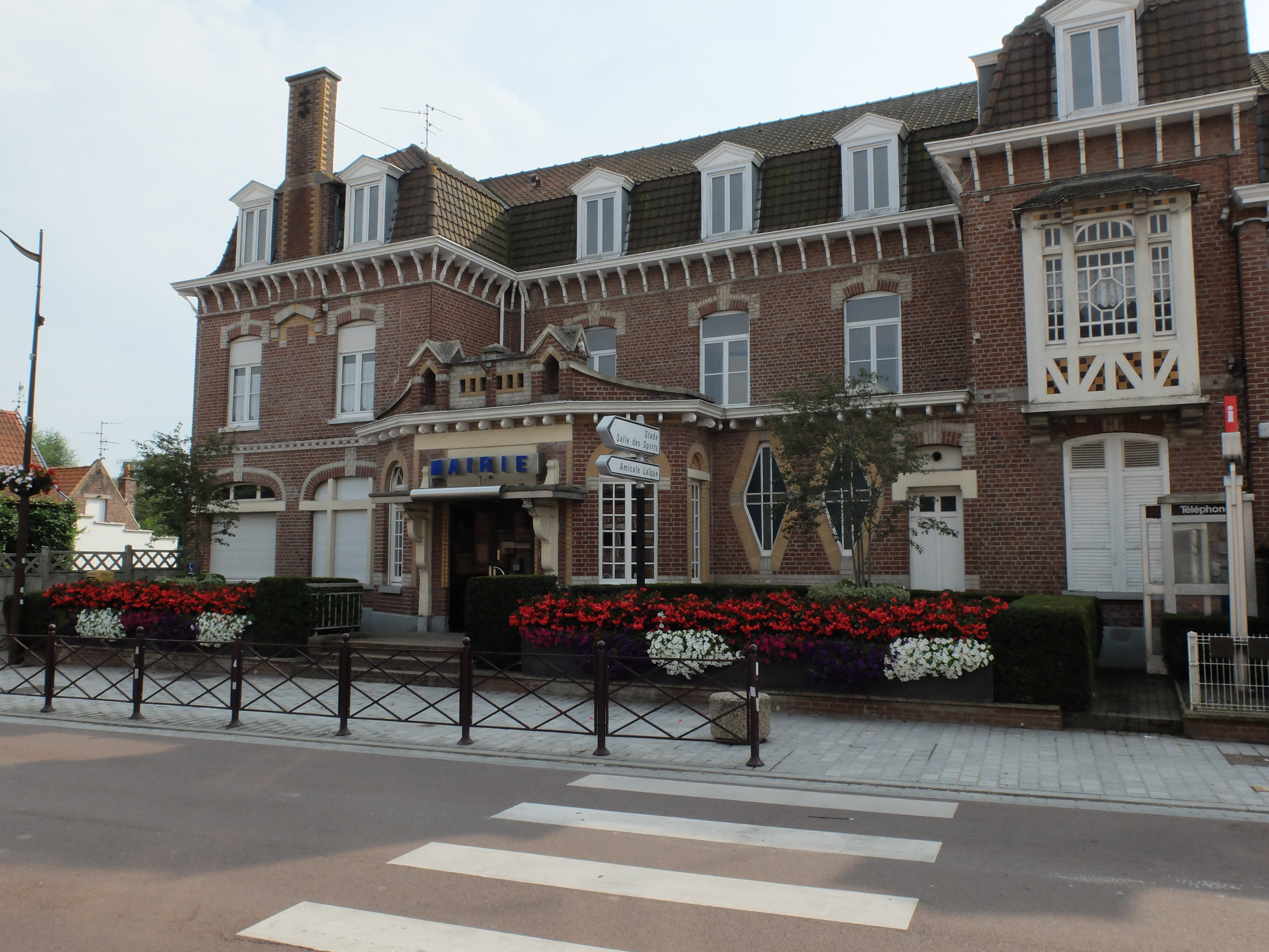 Vue de la mairie de Forest-sur-Marque.